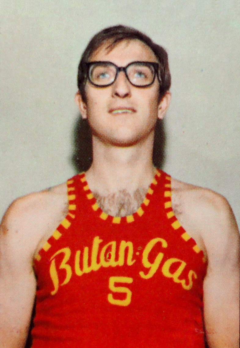 CAMPIONI DELLO SPORT 1969/70-n.315-BERTINI (ITA)-PALLACANESTRO